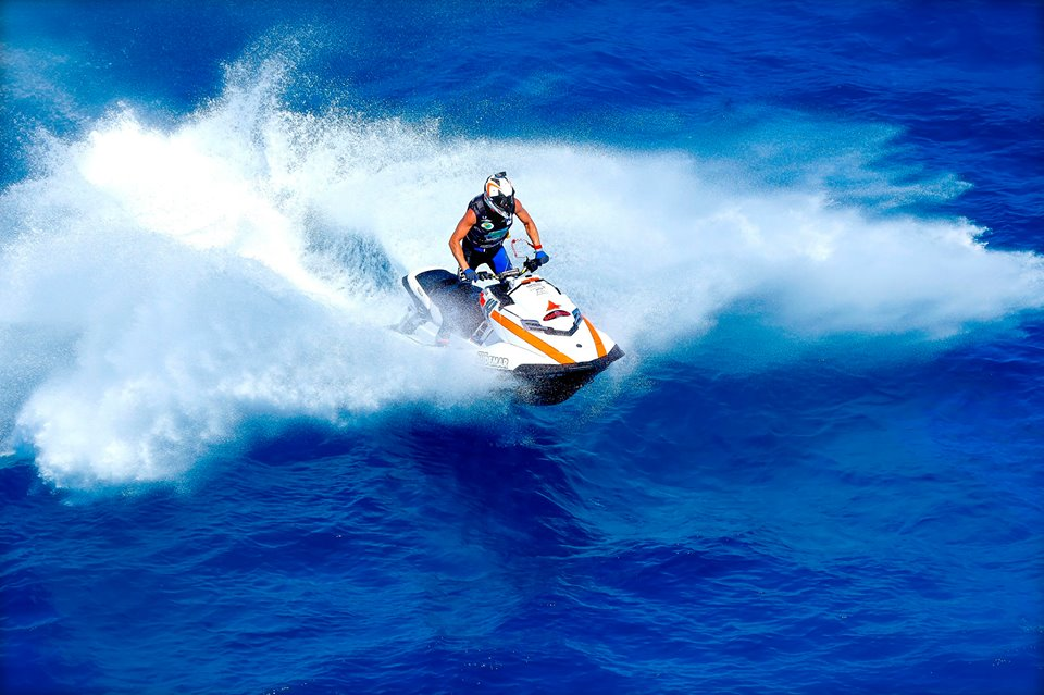 Gara di Offshore